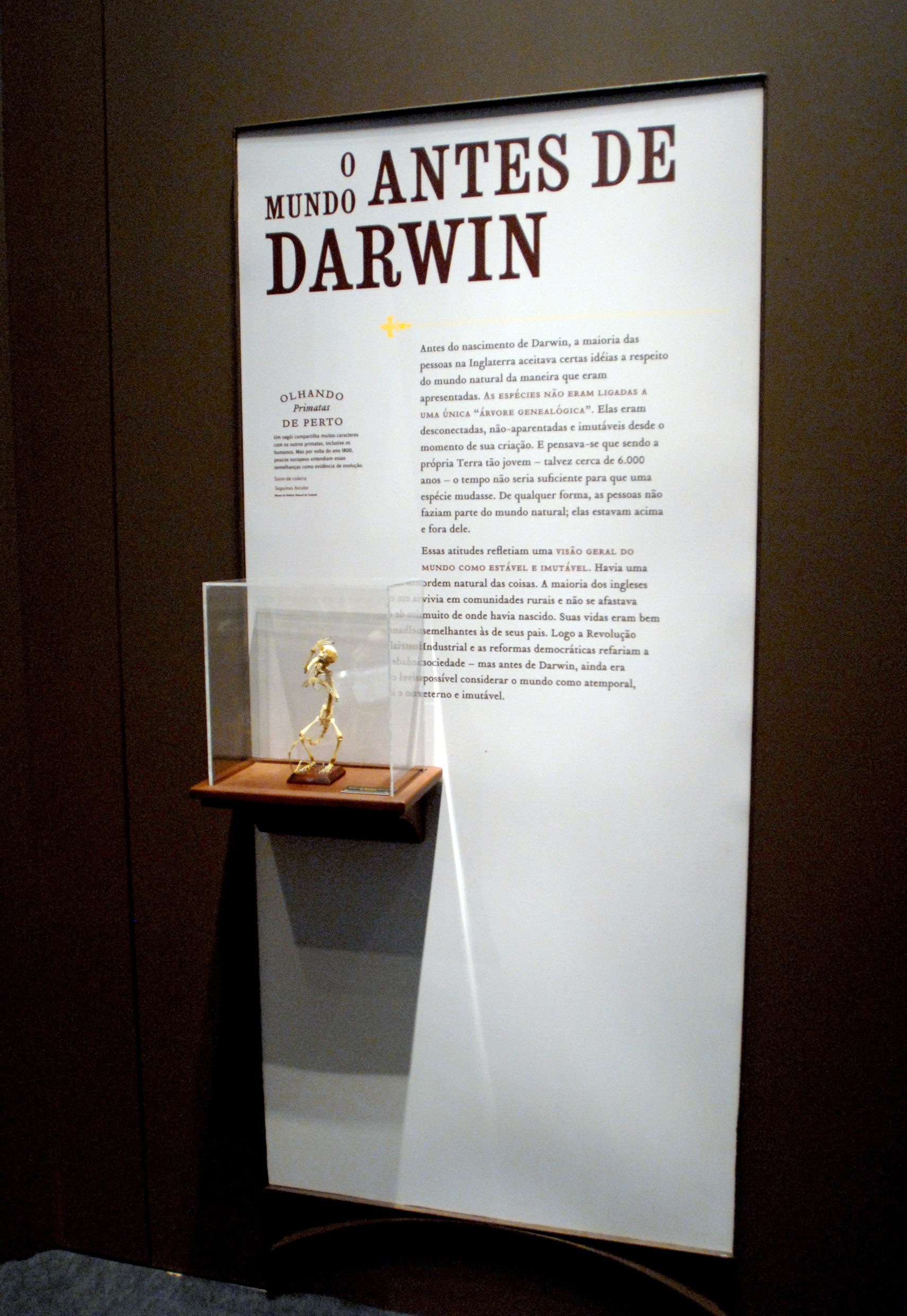 Exposição que marca os 200 anos do nascimento do naturalista Charles Darwin, na Esplanada dos Ministérios, em Brasília